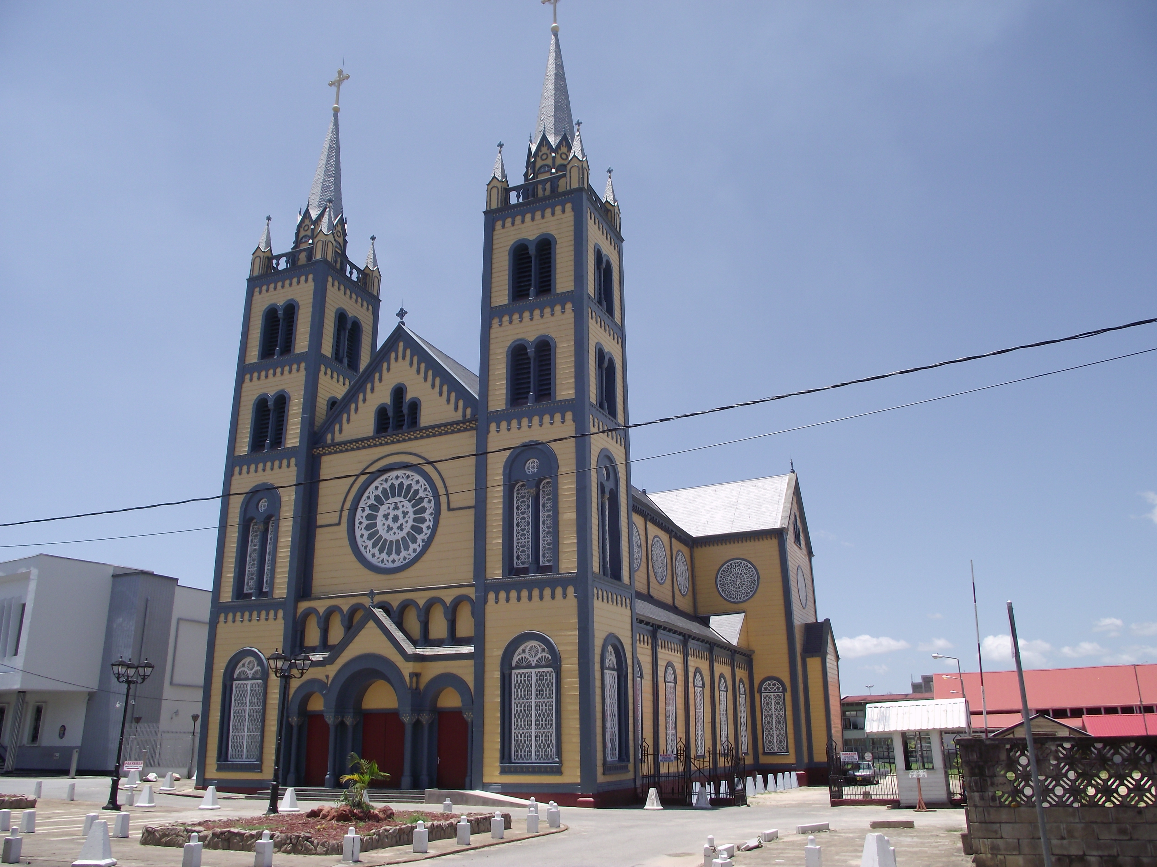 Kathedraal